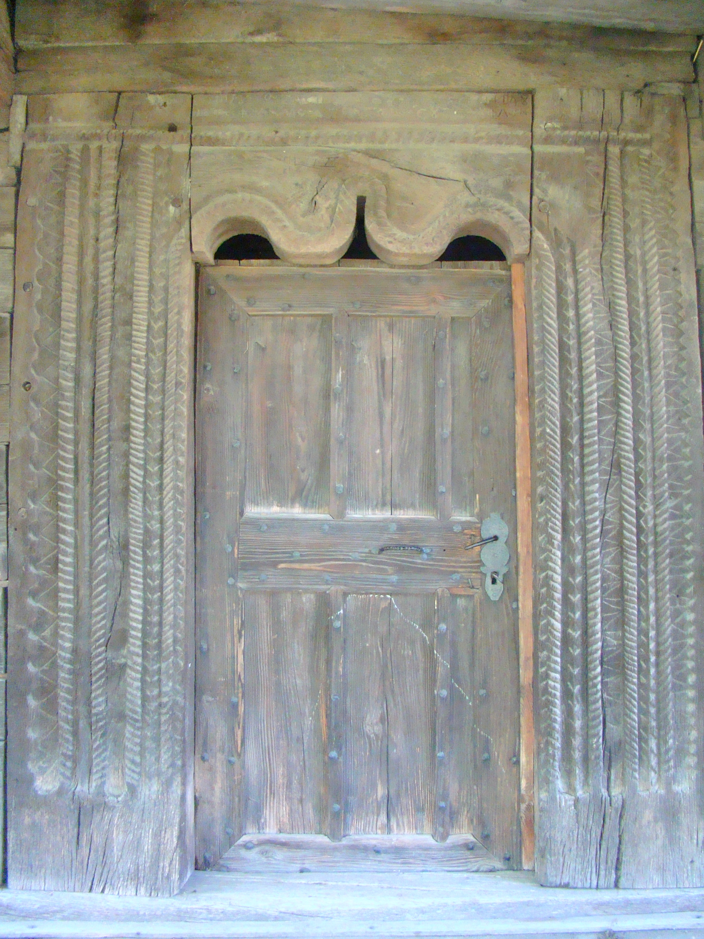 Biserica de lemn „Sf. Arhangheli Mihail și Gavriil”,sat Tilecuș; comuna Tileagd